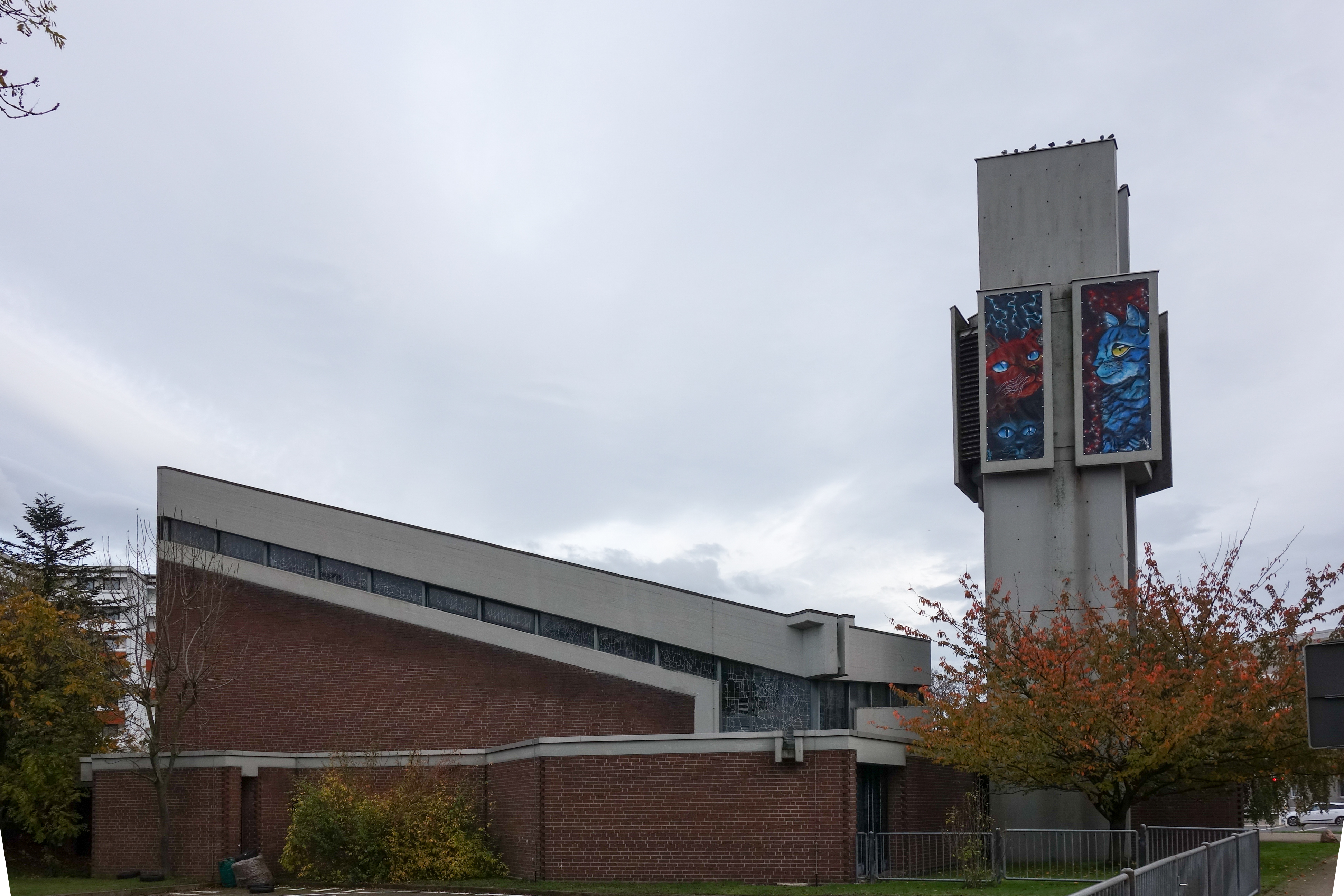 Turm der St.-Elisabeth Kirche mit den von Kindern gestalteten großformatigen Planen (Quelle: Salzgitter-Zeitung vom 26. Mai 2019). Ansicht von Nordwest.